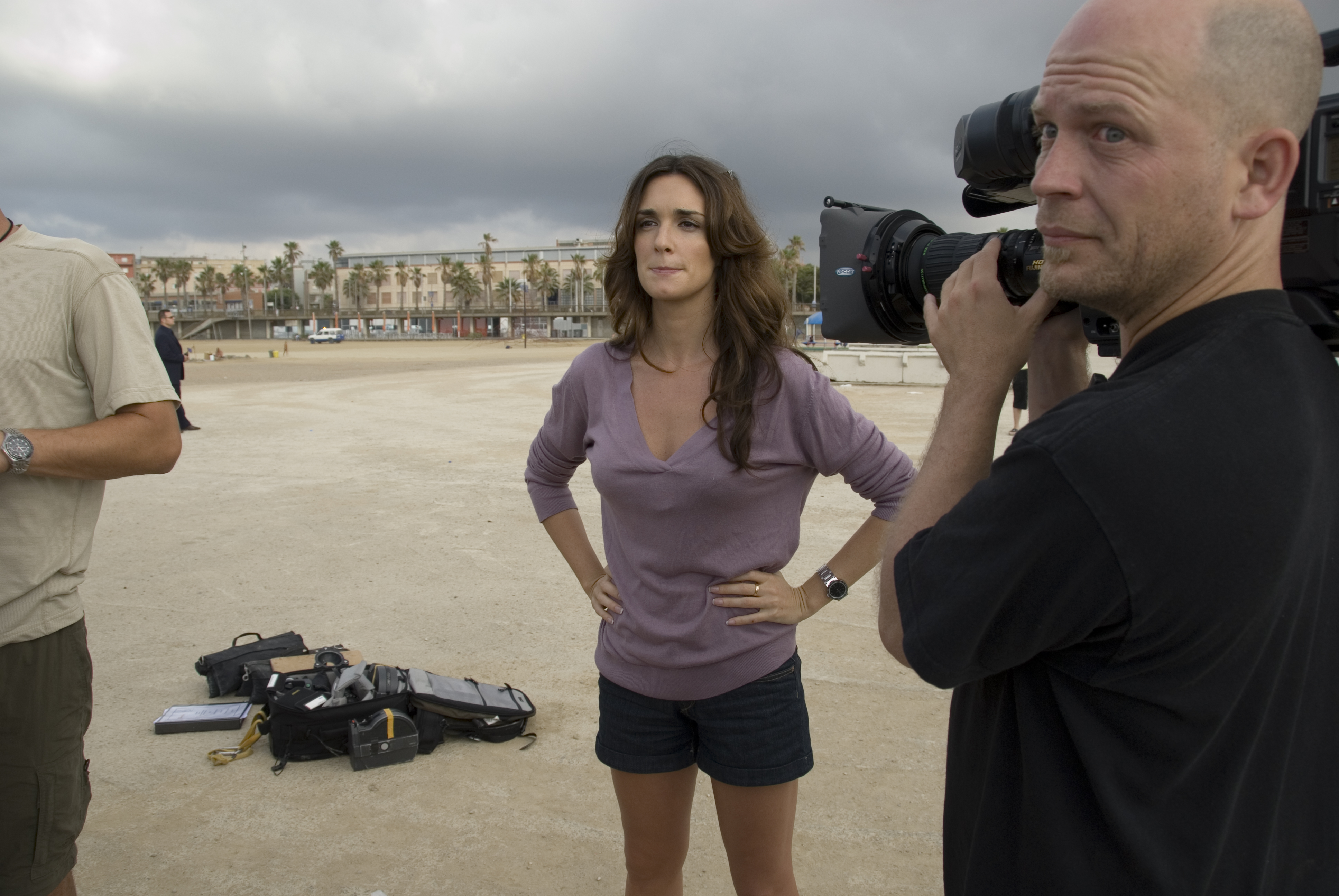 Paz Vega